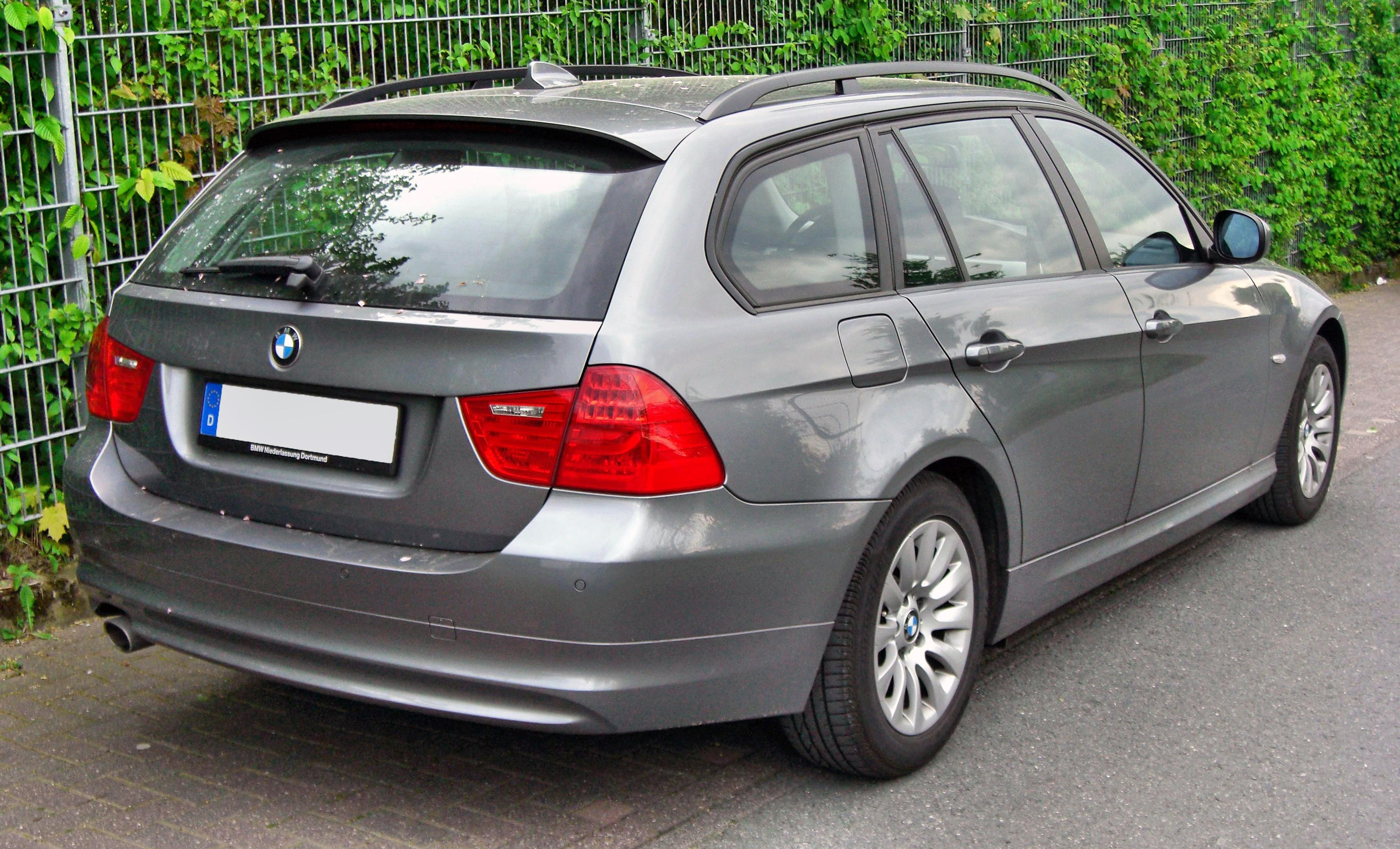 BMW E91 Facelift